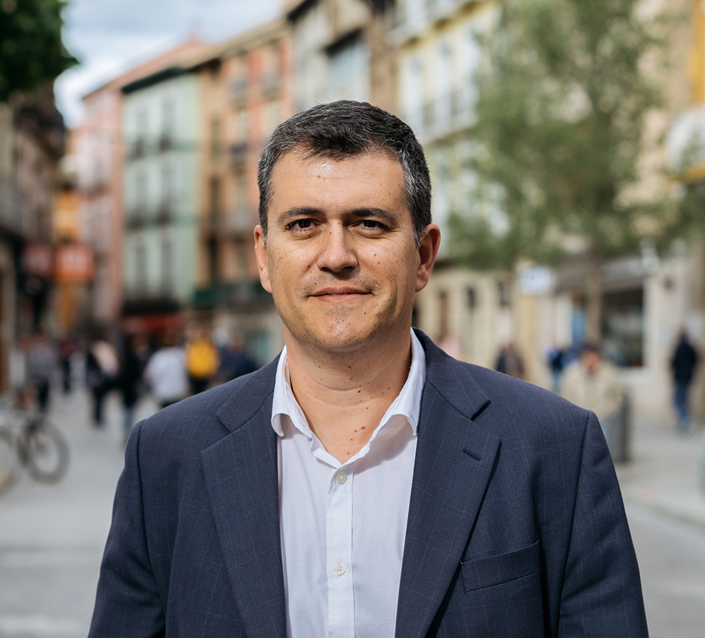 Joaquín Palacín Eltoro